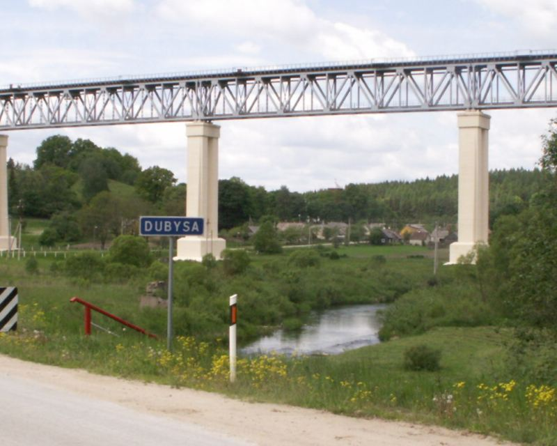 Eisenbahnbruecke ueber die Dubysa in Lyduvenai